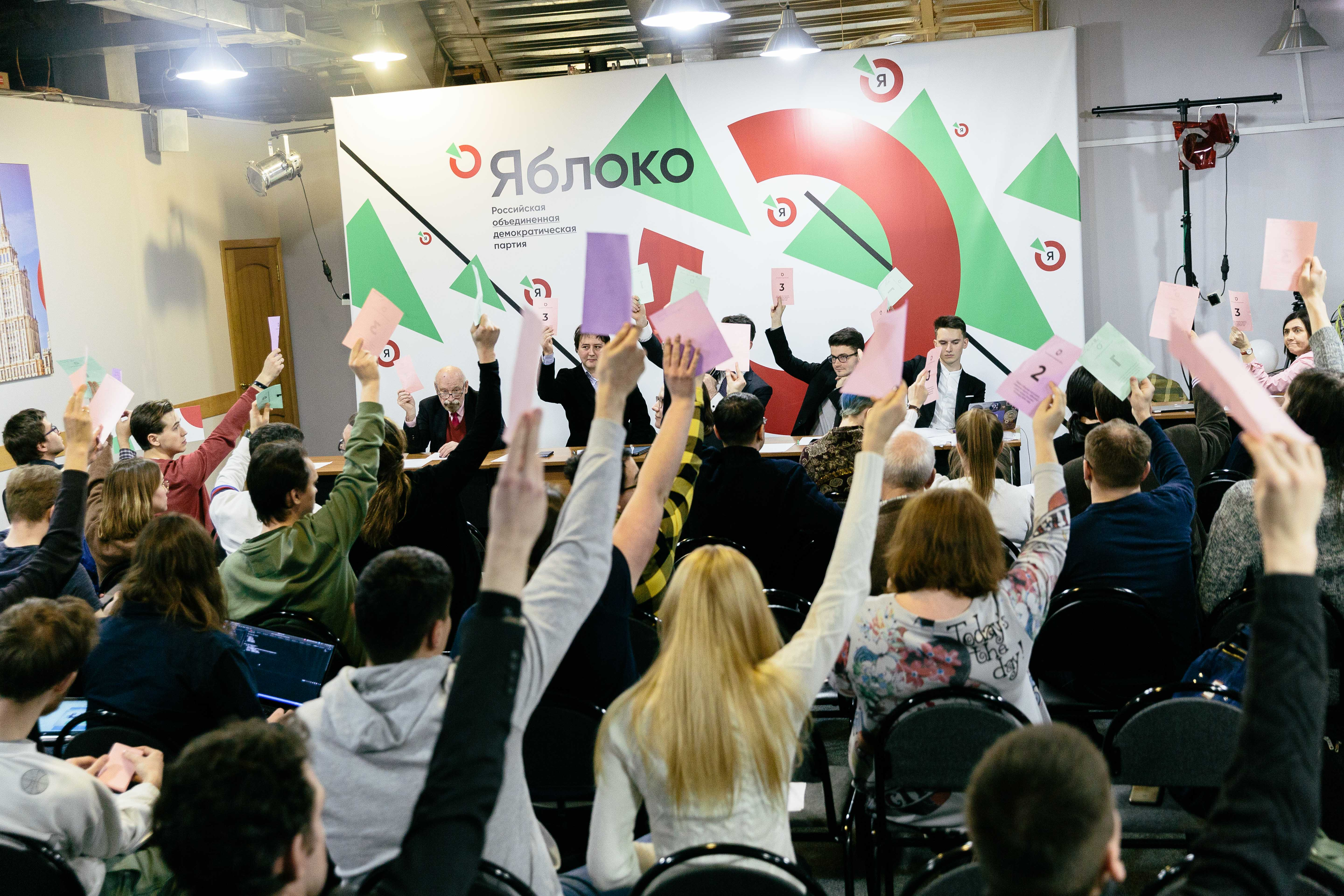 Заседание общего собрания членов партии Яблоко в ЦАО Москвы